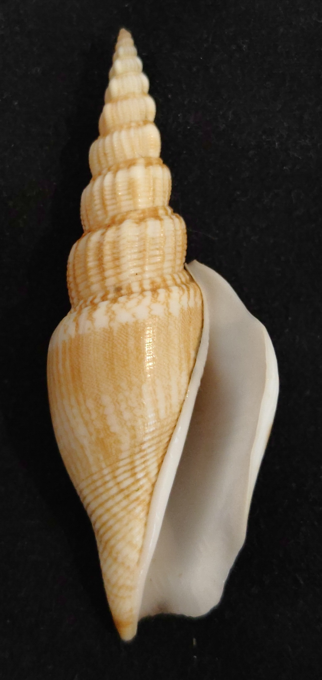 Doxander Entropi Framsida